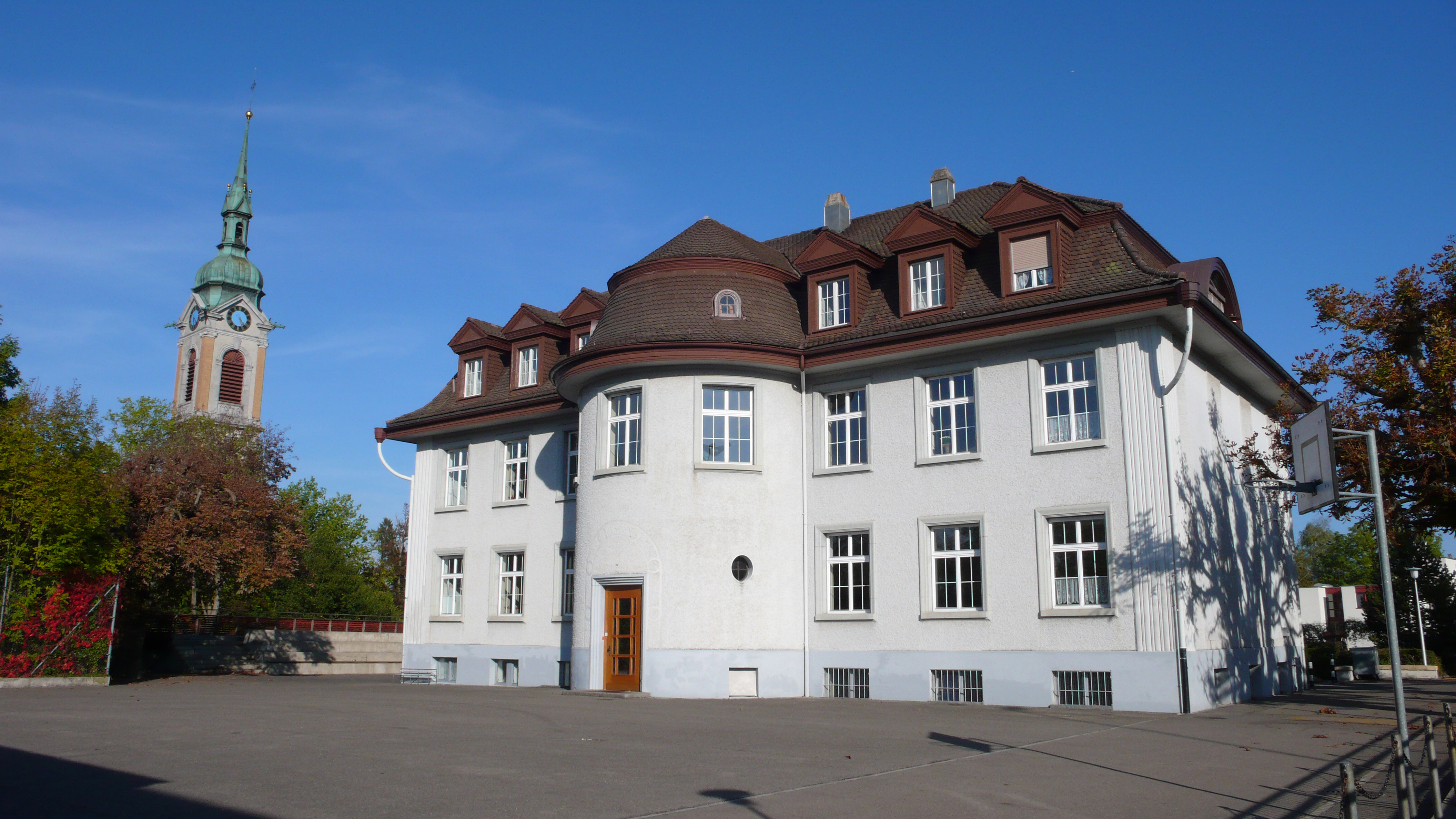 Emmishofer Schulhaus und kath. Kirche St. Stefan in Kreuzlingen